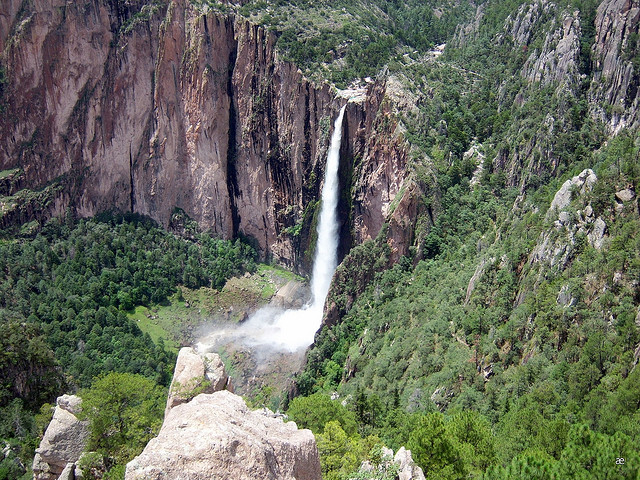 Cascada de Basaseachi, Chihuahua, es una de las cascadas más grandes de México.